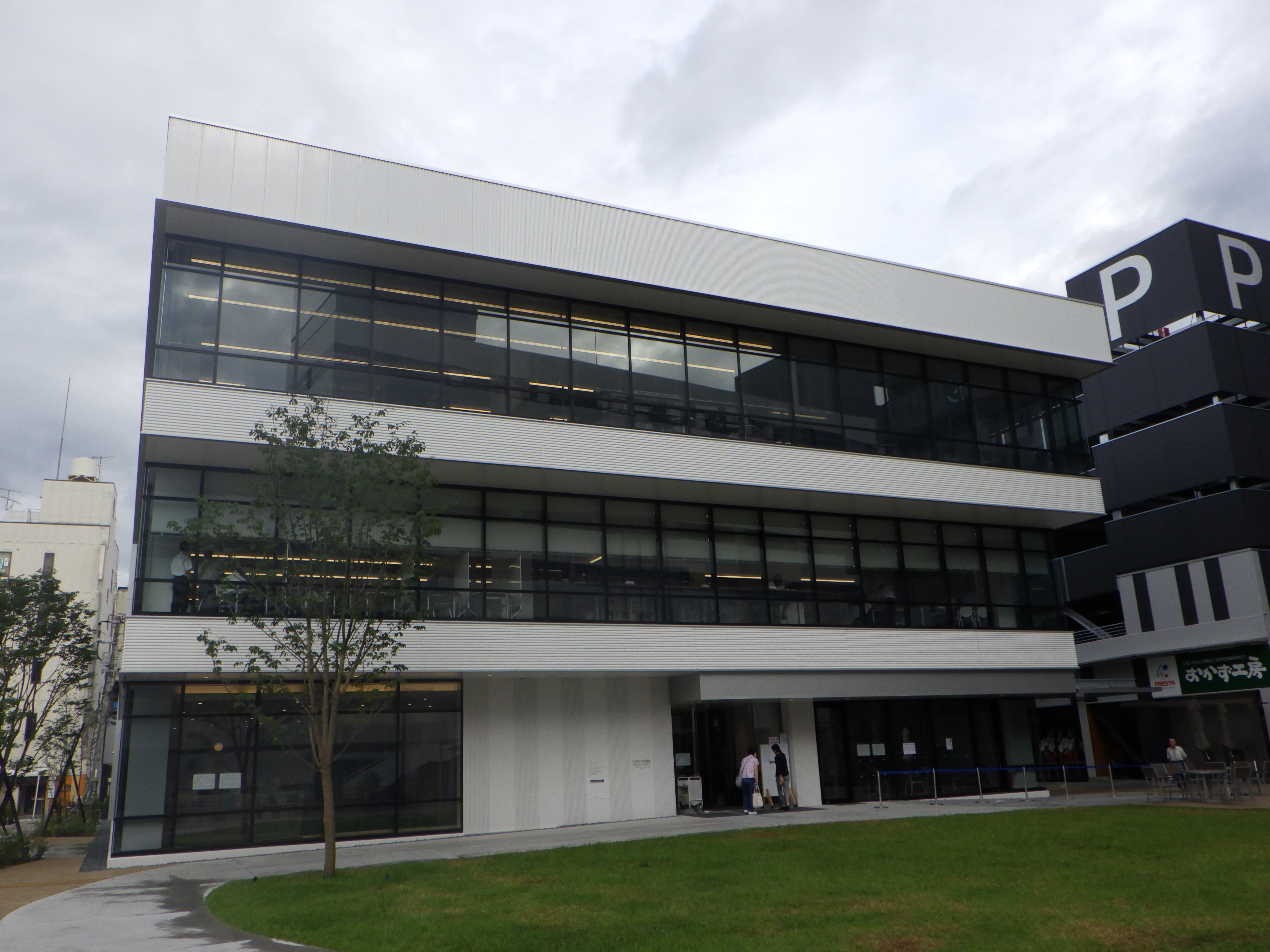 広島県三原市の中央図書館(2020年に移転)